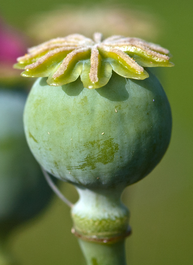 Mohnkapsel